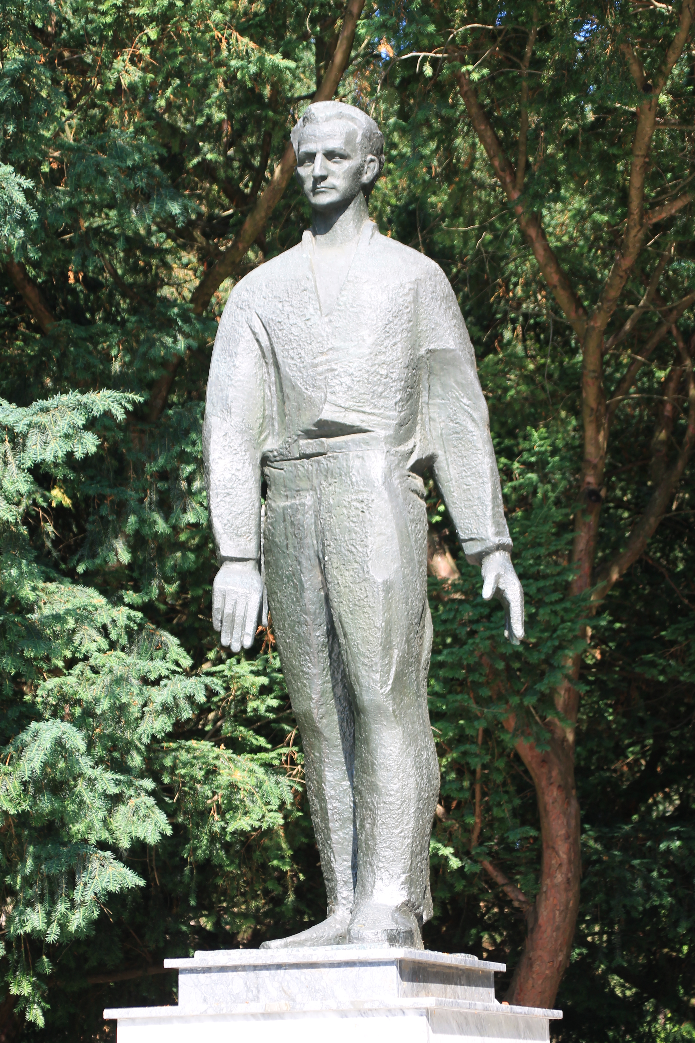 Spomenik Zdravku Čelaru